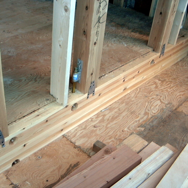 構造用合板_耐力床_01